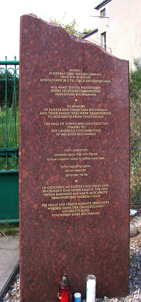 Obelisk potwierdzający darowiznę Josefa Buchmanna na Hol Miast Pomnika Stacja Radegast w Łodzi MZW 2013